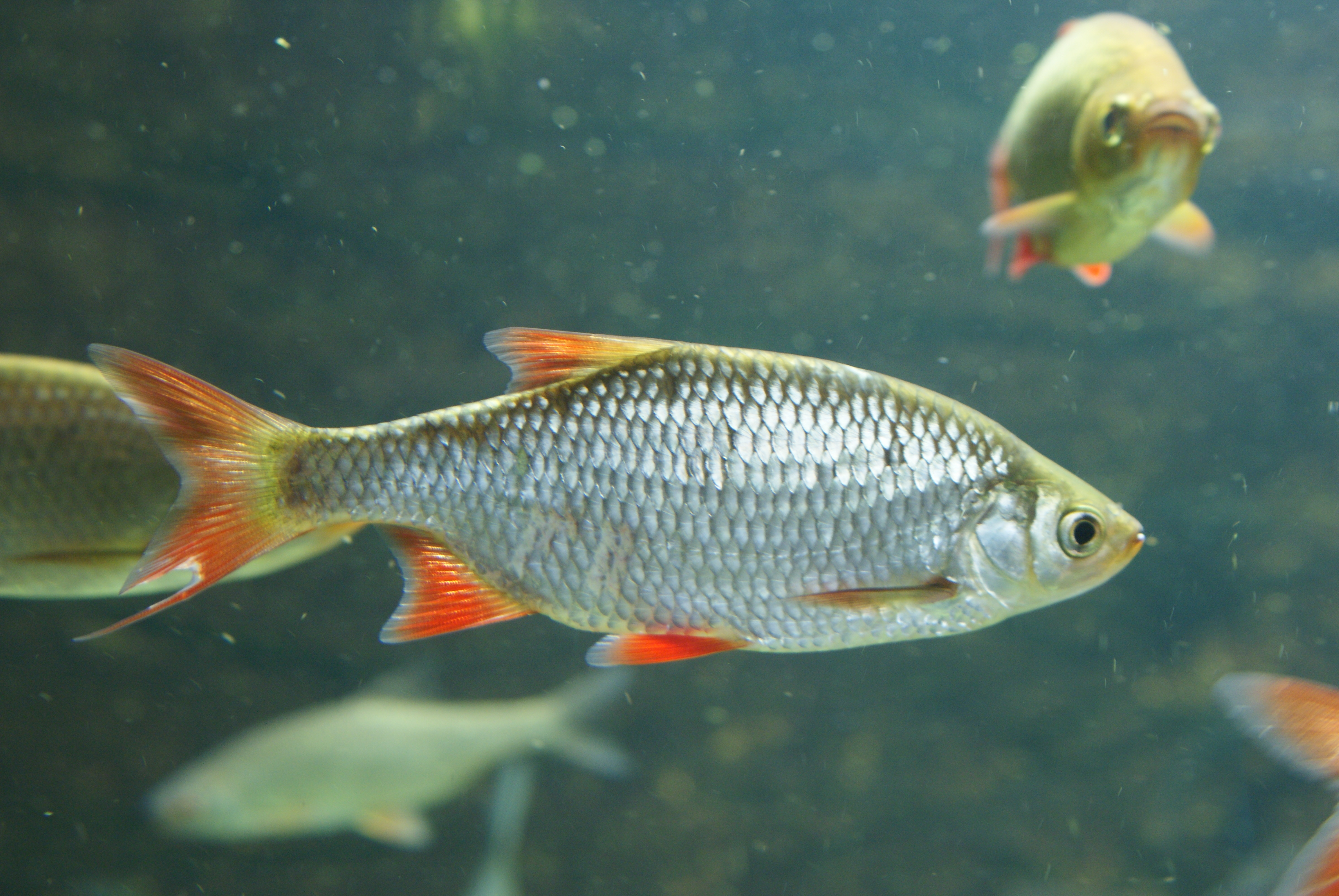 Scardinius erythrophthalmus у Будапешцкім Акеанарыуме